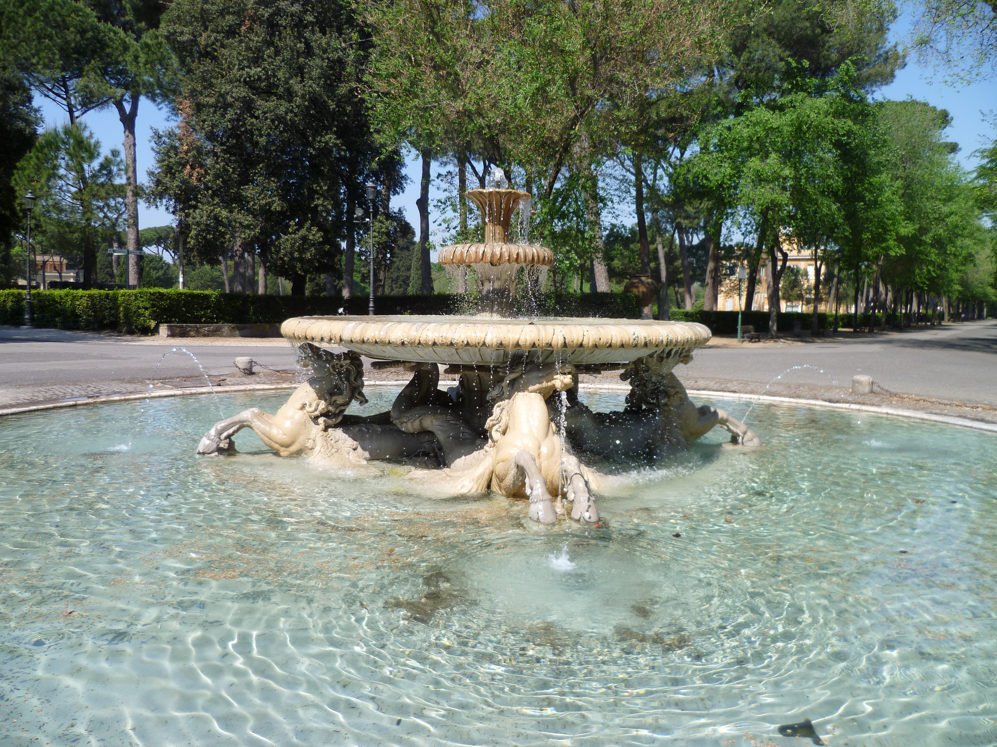 Roma, Villa Borghese, fontana dei cavalli marini